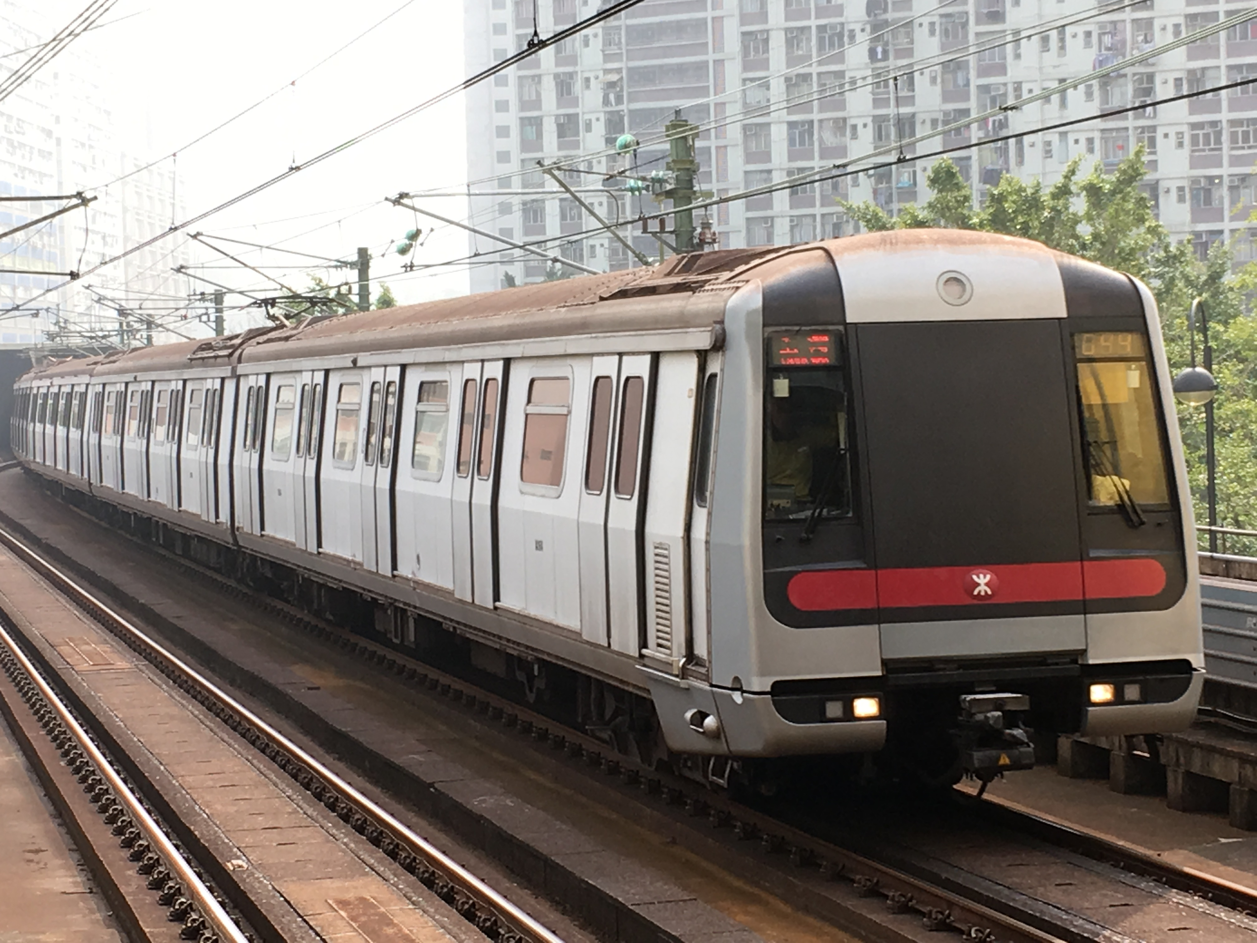 This photo is taken in Kwai Hing Station.